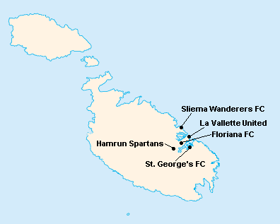 Répartition des clubs en First Division Maltaise 1911-1912.